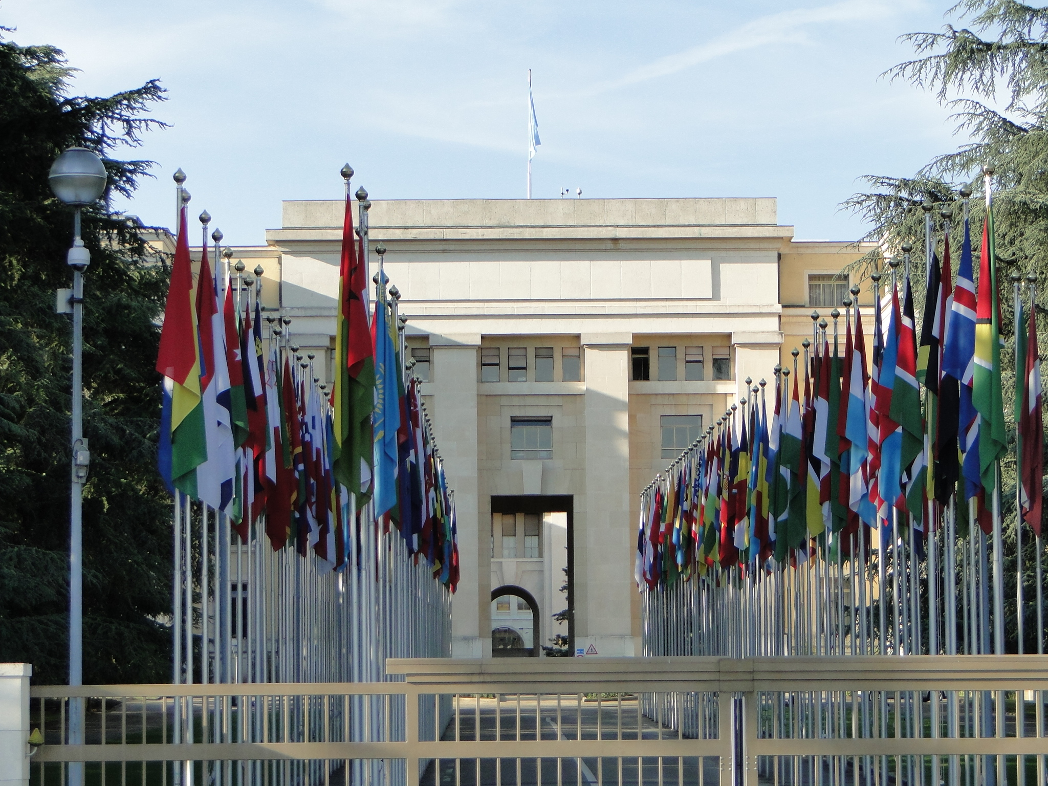 Geneve